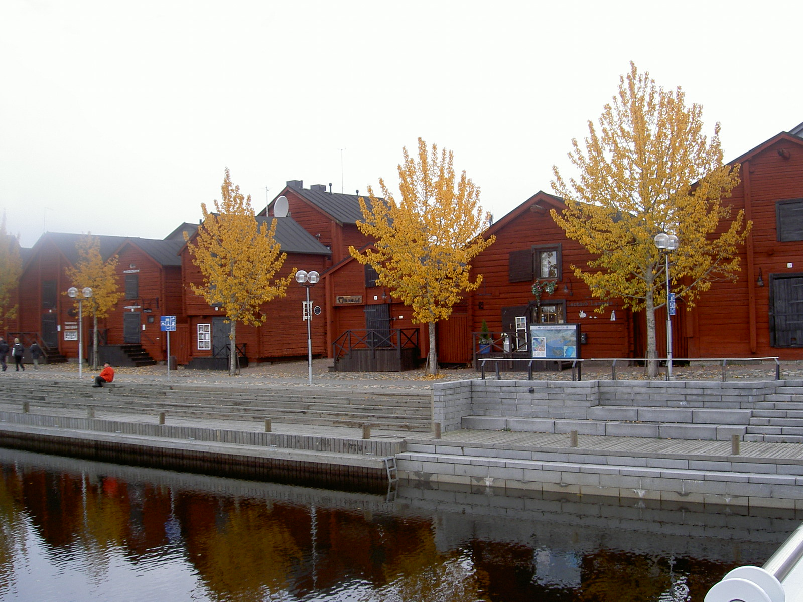 Oulu market Sajat digitalis kamera. --Math 2005. augusztus 1., 18:02 (CEST) hivatkozando forras: Brendel Matyas